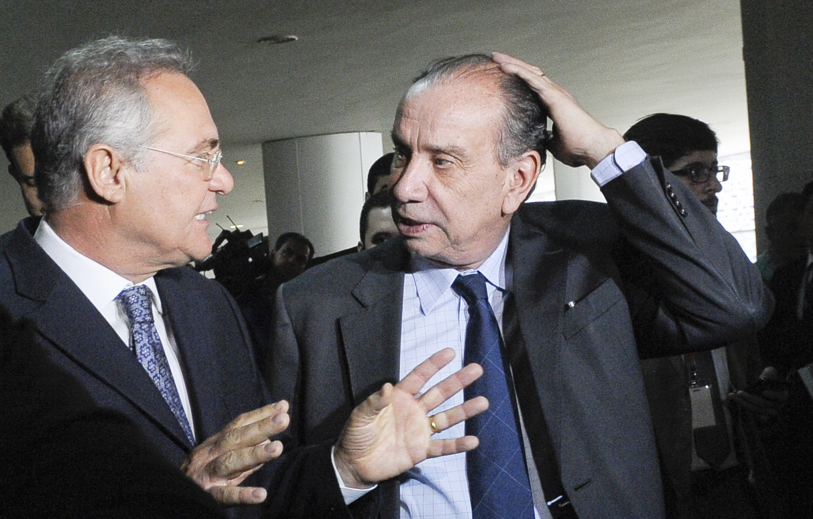 O presidente do Senado Federal, senador Renan Calheiros (PMDB-AL) concede entrevista. Foto: Pedro FranÃ§a/AgÃªncia Senado